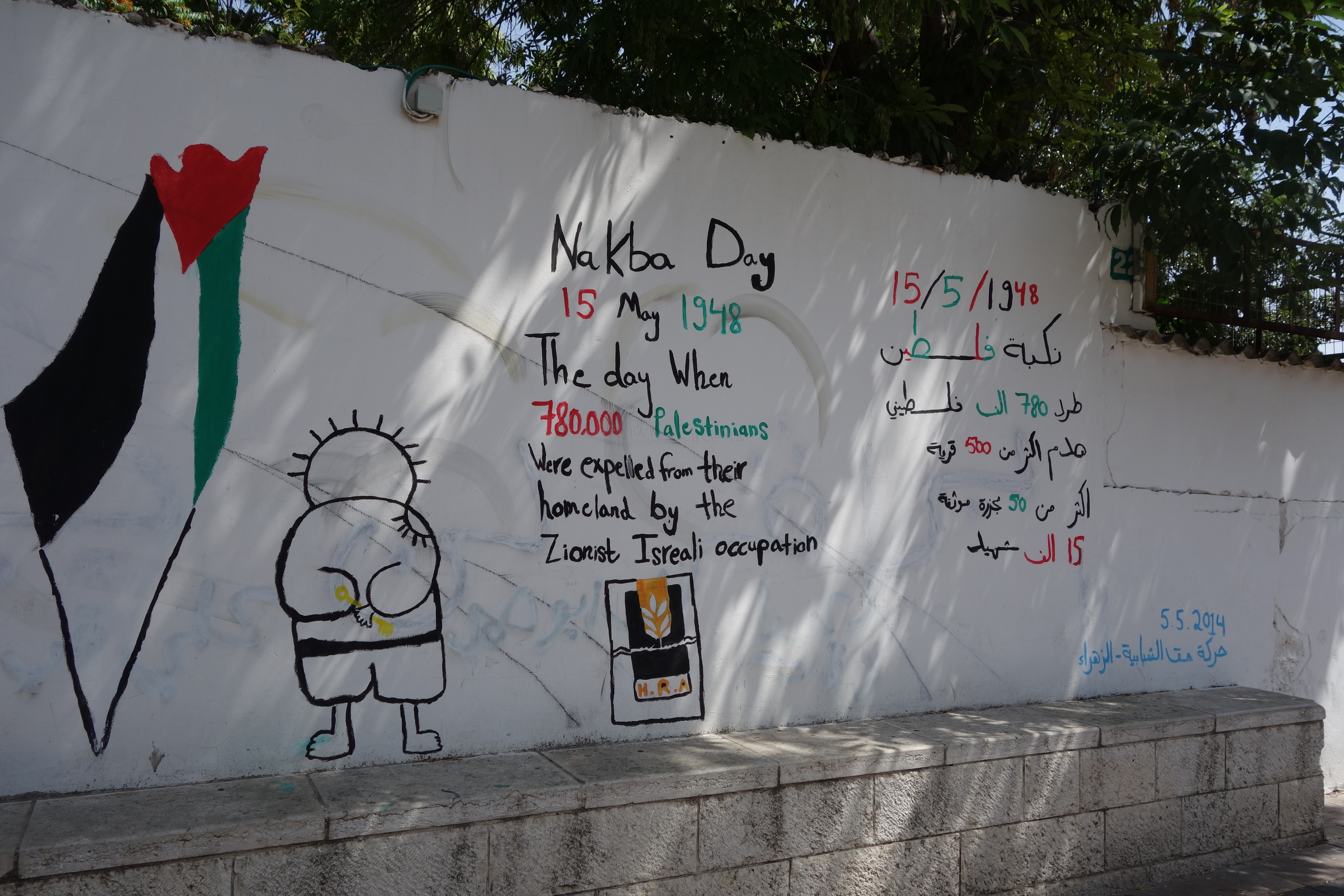 Al Nakba (la catastroph) Graffiti sur un mur de Nazareth en Israël